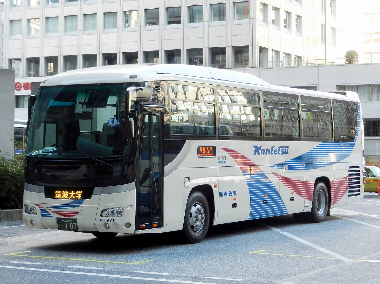 関東鉄道（つくば中央営業所） いすゞ・ガーラ高速路線にて運用中